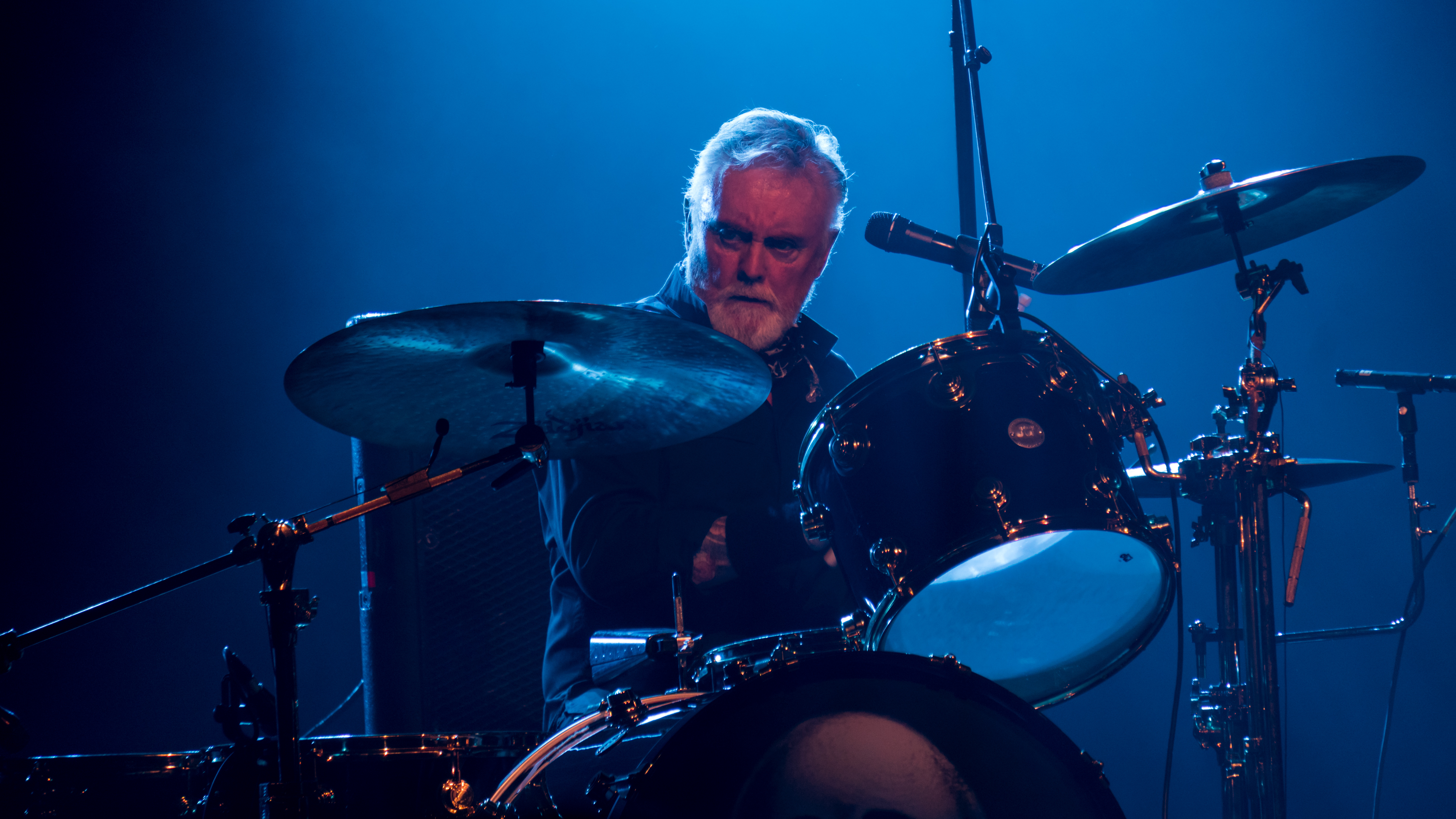 QueenO2121217-47